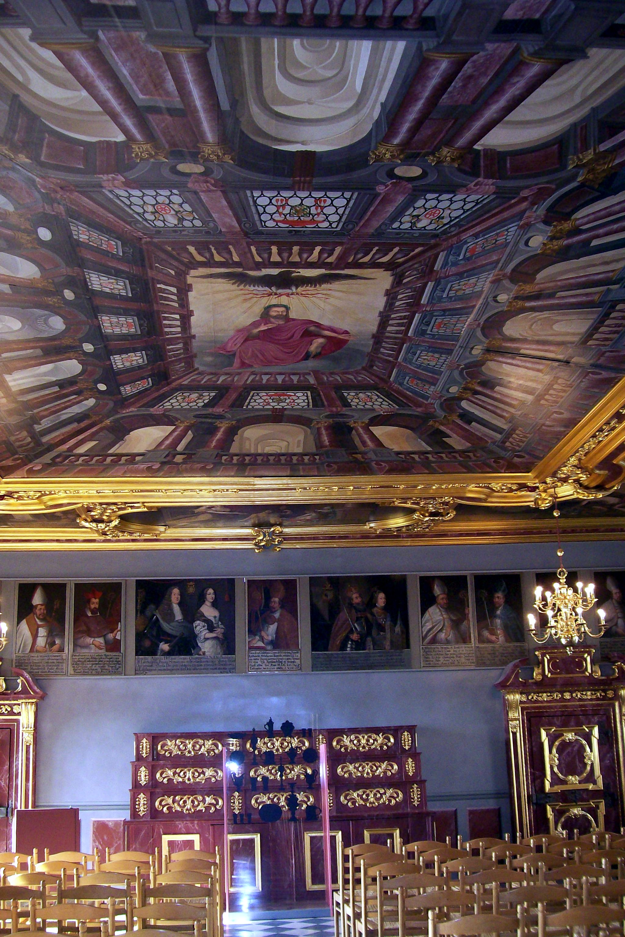 Schloss und Benediktinerabtei Iburg in Bad Iburg, Rittersaal mit Deckenmalerei in perspektivischer Scheinarchitektur von Andrea Alovisii aus dem 17. Jahrhundert